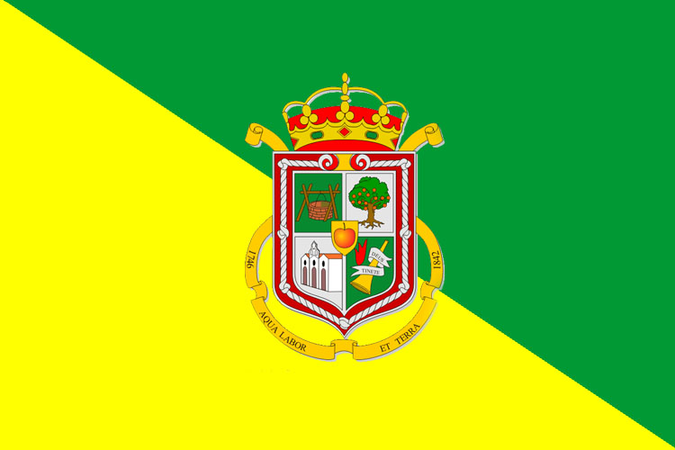 Bandera del municipio de Valleseco, ubicado en la isla de Gran Canaria (España)